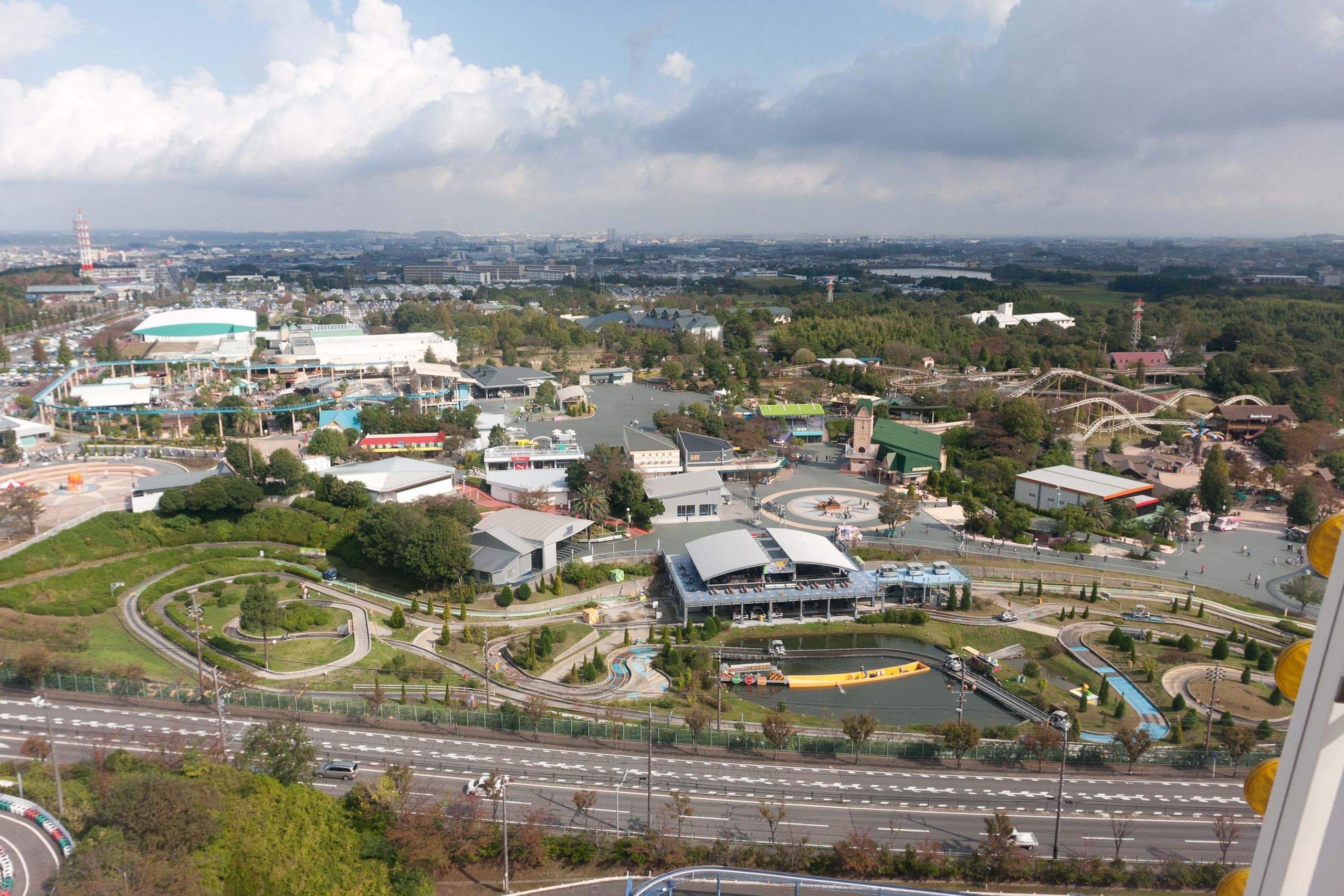 Motopia, Suzuka, Mie, Japan